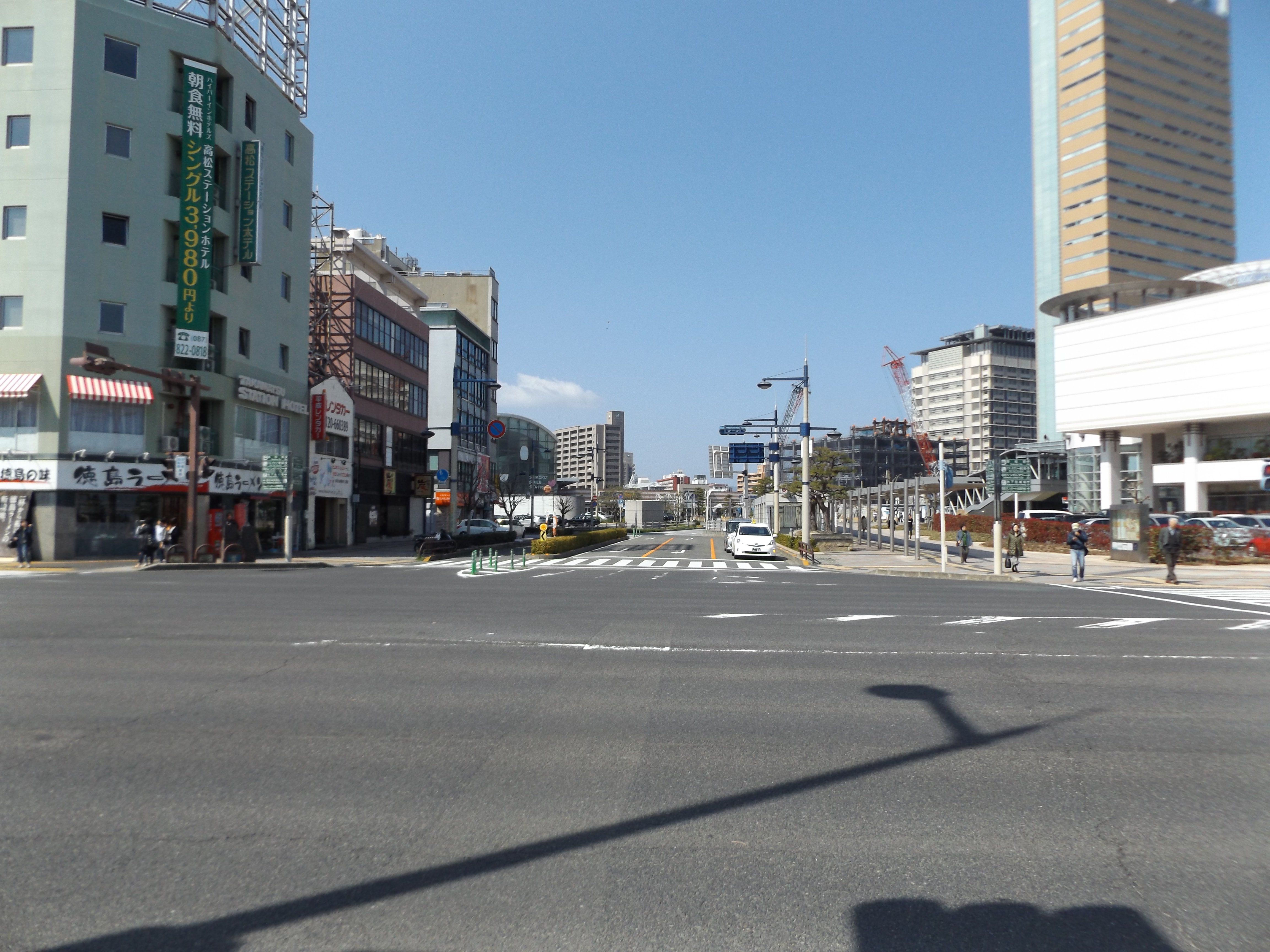 香川県高松市の高松駅前交差点。国道30号と香川県道173号高松停車場栗林公園線の交点で、香川県道173号の起点でもある。